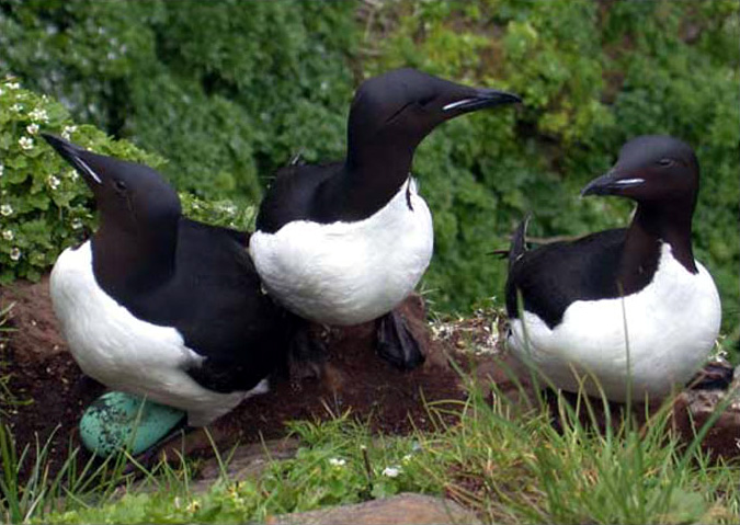 Beschreibung: Dickschnabellumme (Uria lomvia) Fotograf: Verena Gill